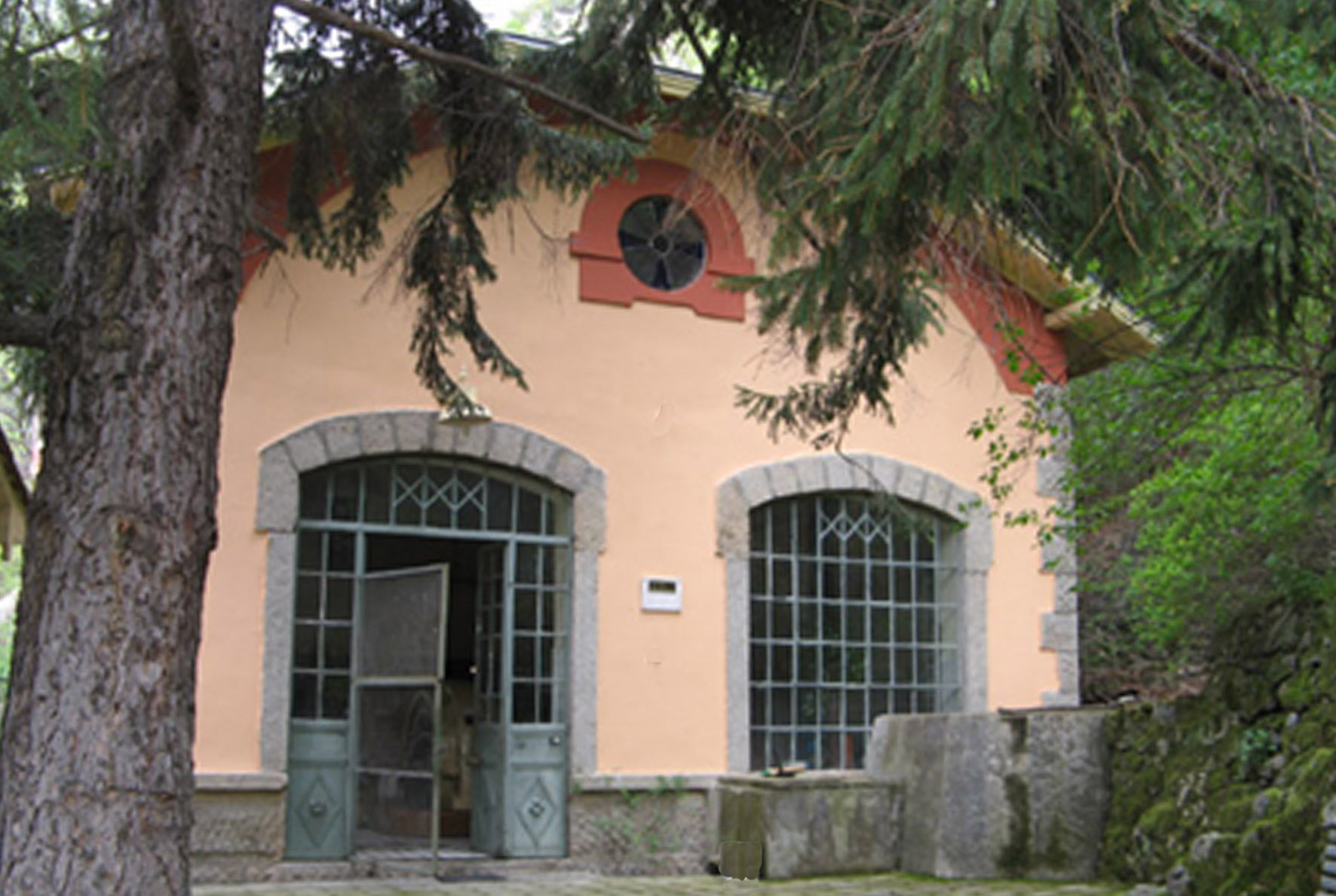 ВЕЦ Енина